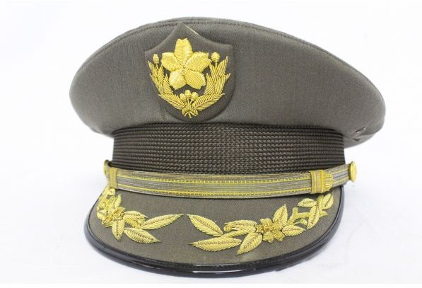 70式後期佐官正帽